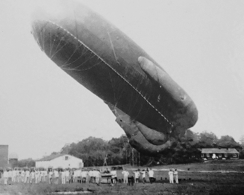 Drakballong, Norra Frösunda (Lilla Frösunda) i Solna